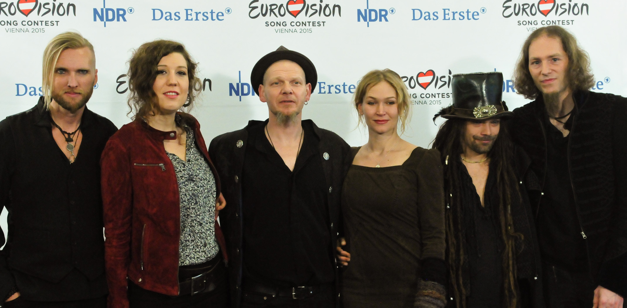 Faun, Unser Song für Österreich 2015, Probe und Pressekonferenz in Hannover